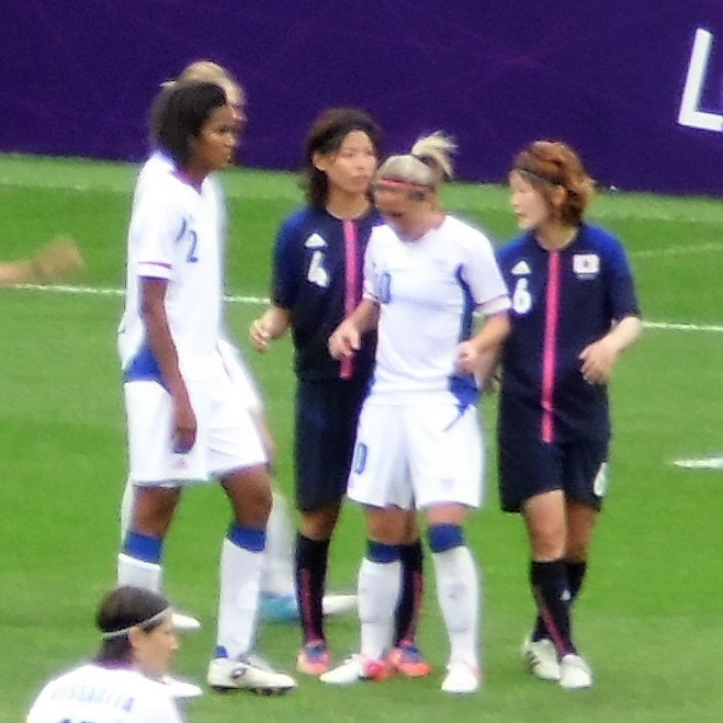 France vs Japon lors des JO de Londres 2012. Wendie Renard, Saki Kumagai (熊谷紗希), Camille Abily et Mizuho Sakaguchi (阪口夢穂).